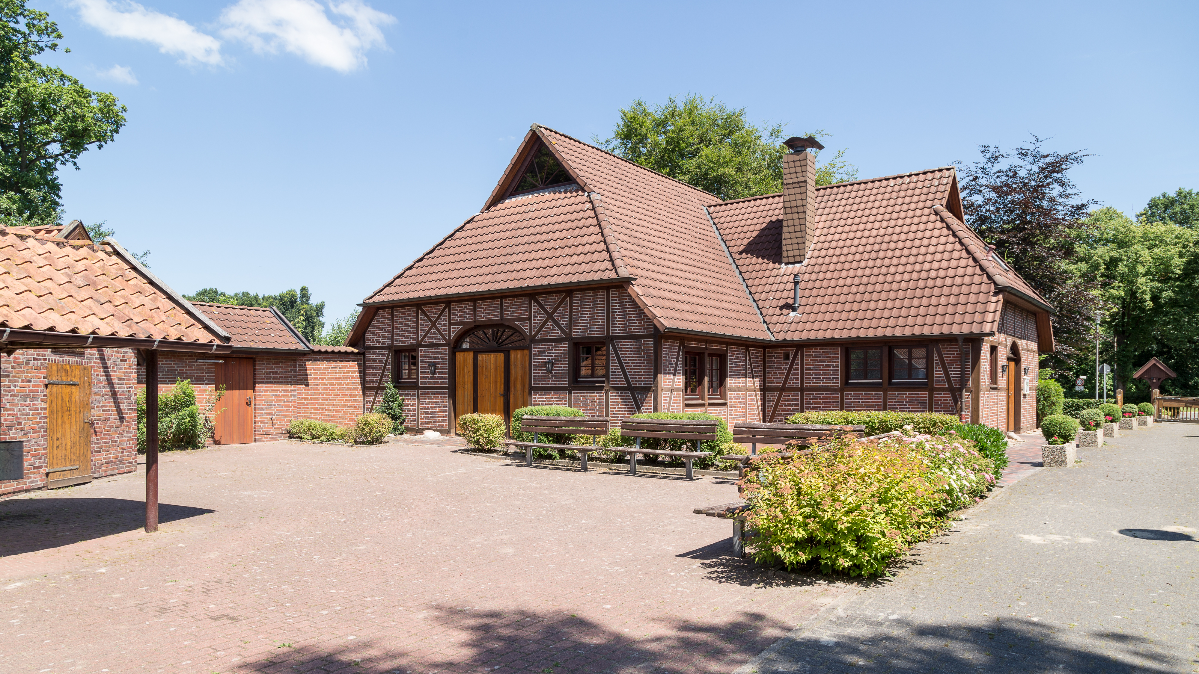 "Dörpshus Borbeck", Dorfgemeinschaftshaus des Heimat- und Ortsbürgervereins Borbeck. (Mietbarer) Veranstaltungsort in der Gemeinde Wiefelstede.